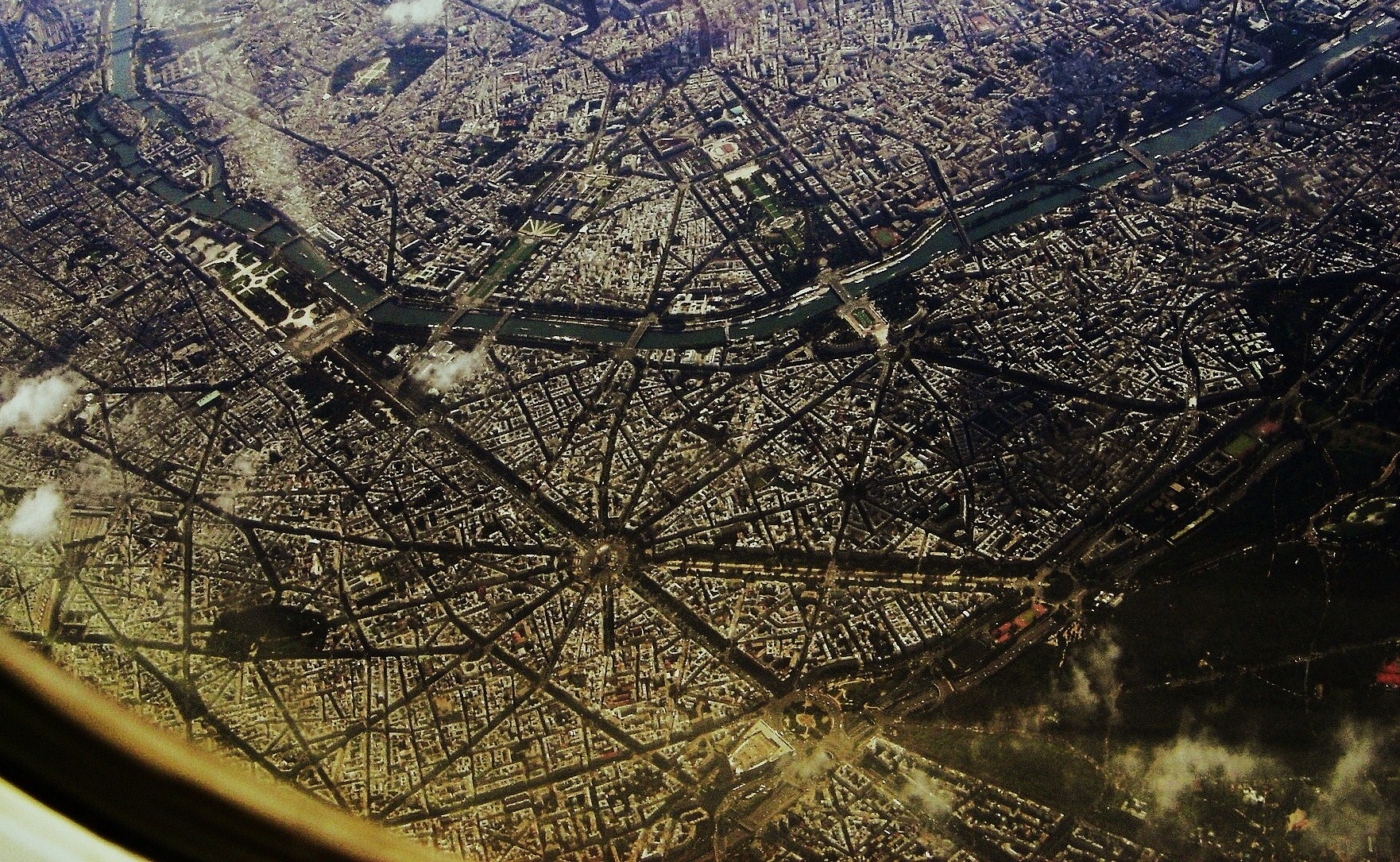 Photo prise d'avion le 26 septembre 2004